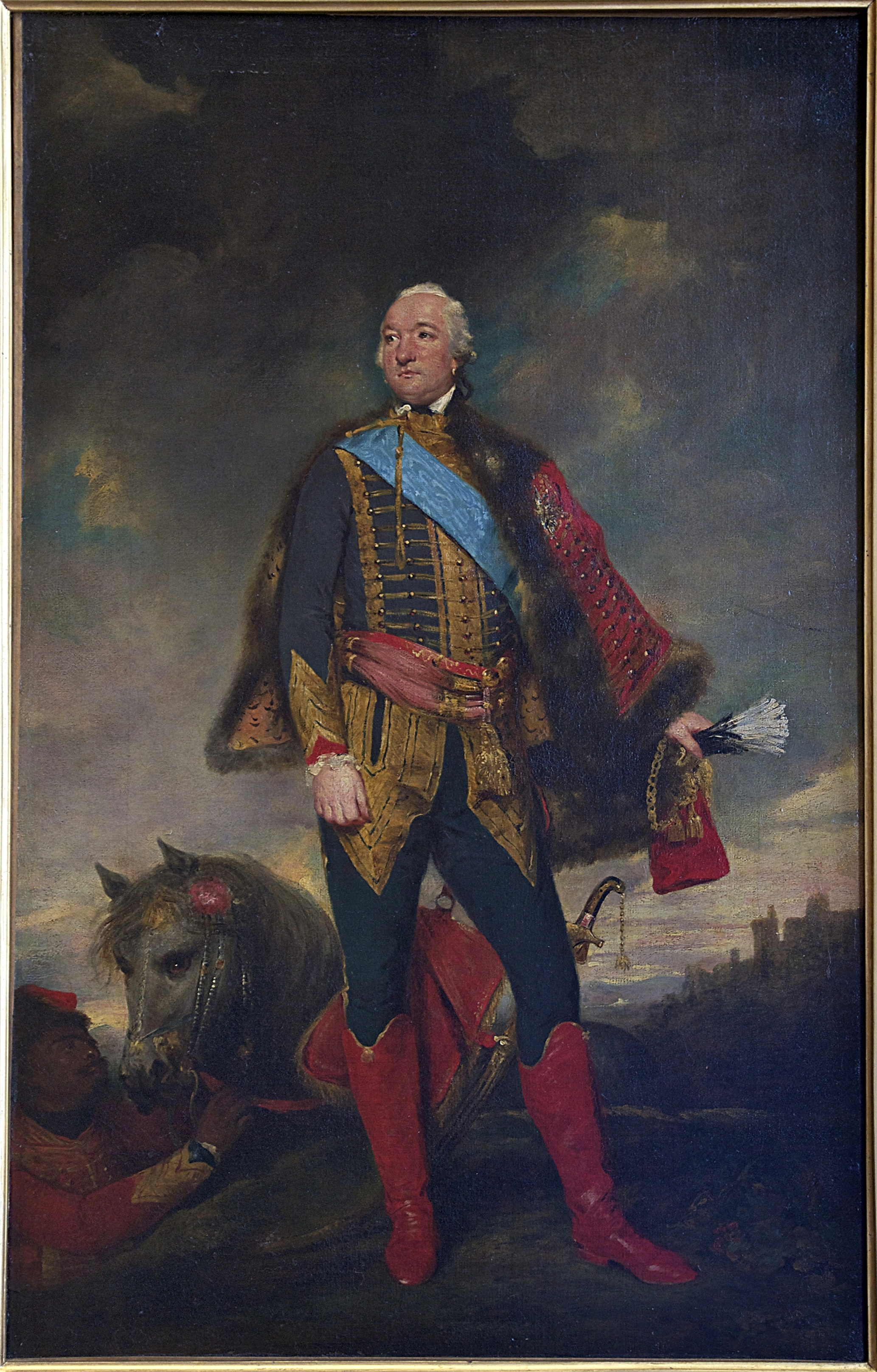 Louis Philippe d'Orléans, duc de Chartres (ultérieurement duc d'Orléans, puis Philippe-Egalité), en uniforme de hussards, copie d'après un original disparu